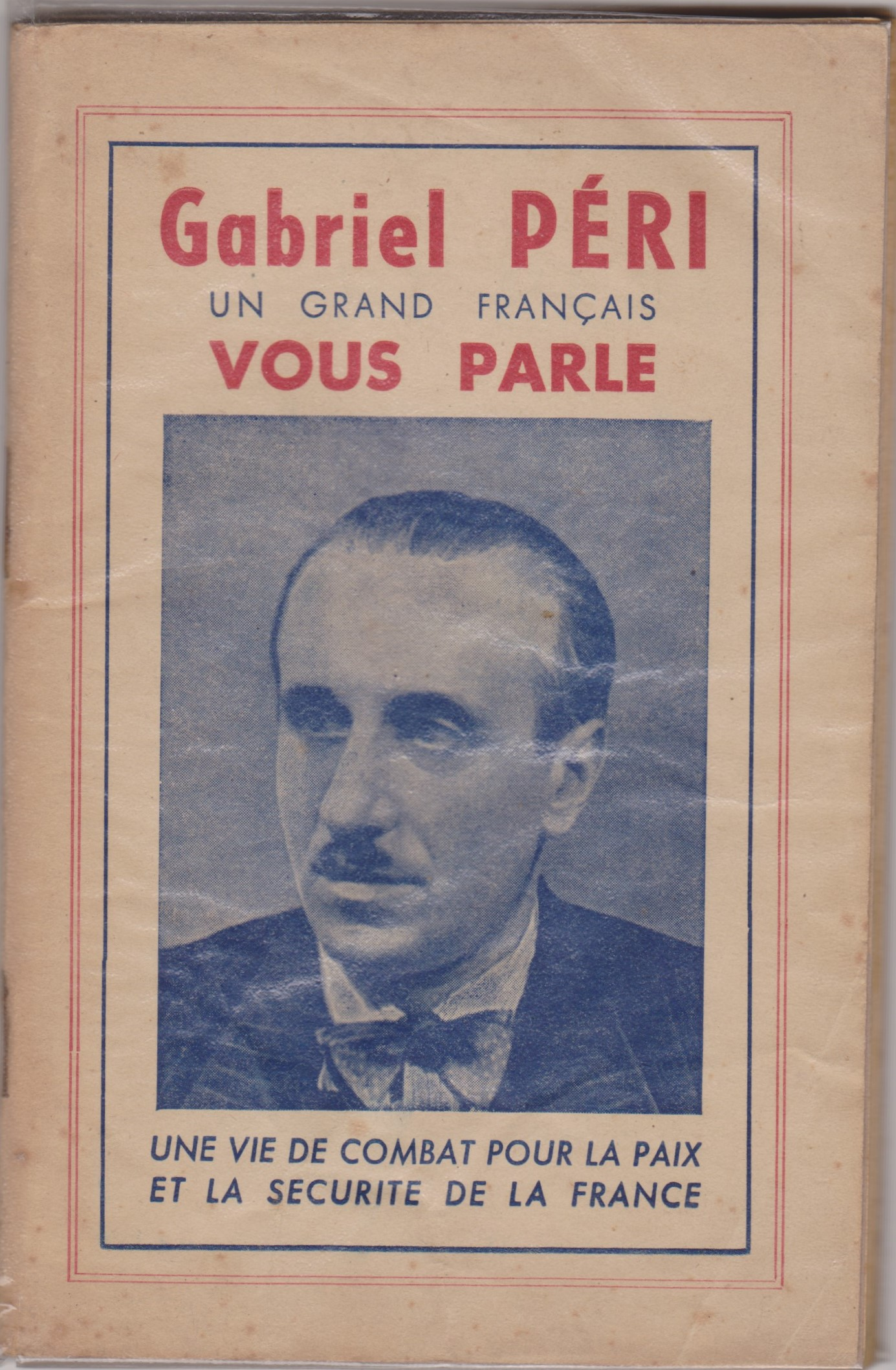 La brochure (au format 18 x 11,5 cm), Gabriel Péri, un grand français vous parle, est éditée en 1946 par le Parti communiste français, pour le 5e anniversaire de la mort du journaliste. En introduction un texte de Marcel Cachin, directeur du journal L'Humanité, puis le poème de Louis Aragon : " Ballade de celui qui chanta dans les supplices". Le corps de la brochure est constitué d'extraits de discours prononcés à la Chambre des députés, d'articles écrits dans L'Humanité et de la brochure clandestine de 1941 : " Non, le nazisme n'est pas le socialisme ". 80 pages au total, prix 15 Fr.